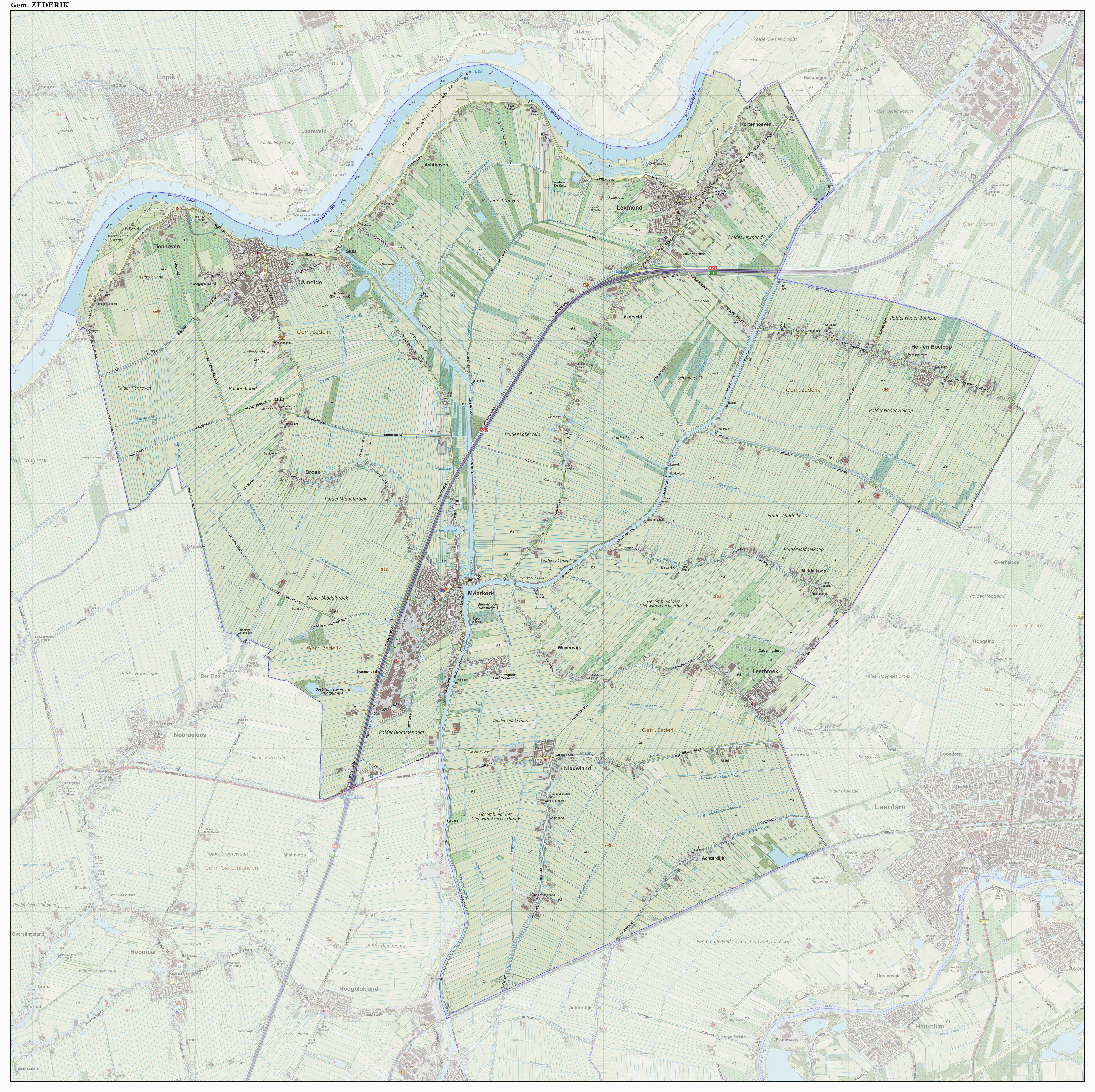 Topografische gemeentekaart. Resolutie: 300 pixels/km. Kaartbeeld samengesteld uit de open geodata van de Top10NL en Top25namen (Kadaster), Creative Commons-BY licentie. Gebouwvlakken uit open geodata BAG extract. Wegen uit de OpenStreetMap, OpenStreetMap community. Reliëfschaduw uit de Actuele Hoogtekaart AHN2. Samenstelling en kleurenschema: Jan-Willem van Aalst, met QGIS. Zie ook de Legenda.